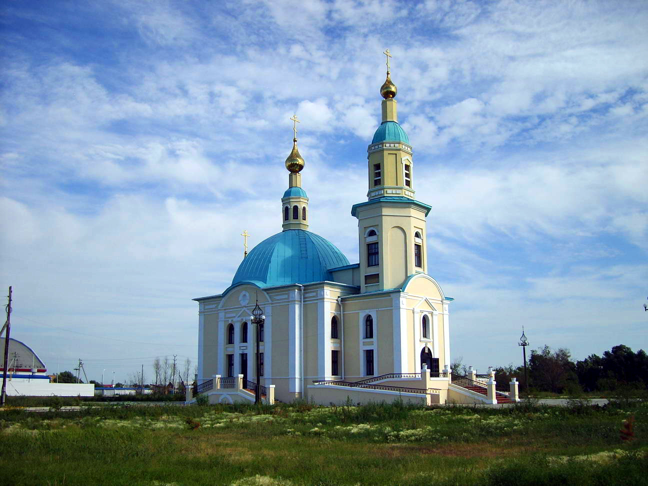 Храм Новомучеников и Исповедников Российских г.Исилькуль